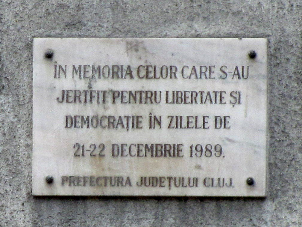 Cluj-Napoca - Str.Universității,nr.3 - colț cu Piața Unirii - Placă în memoria celor care s-au jertfit pentru libertate și democrație în zilele de 21-22 Decembrie 1989